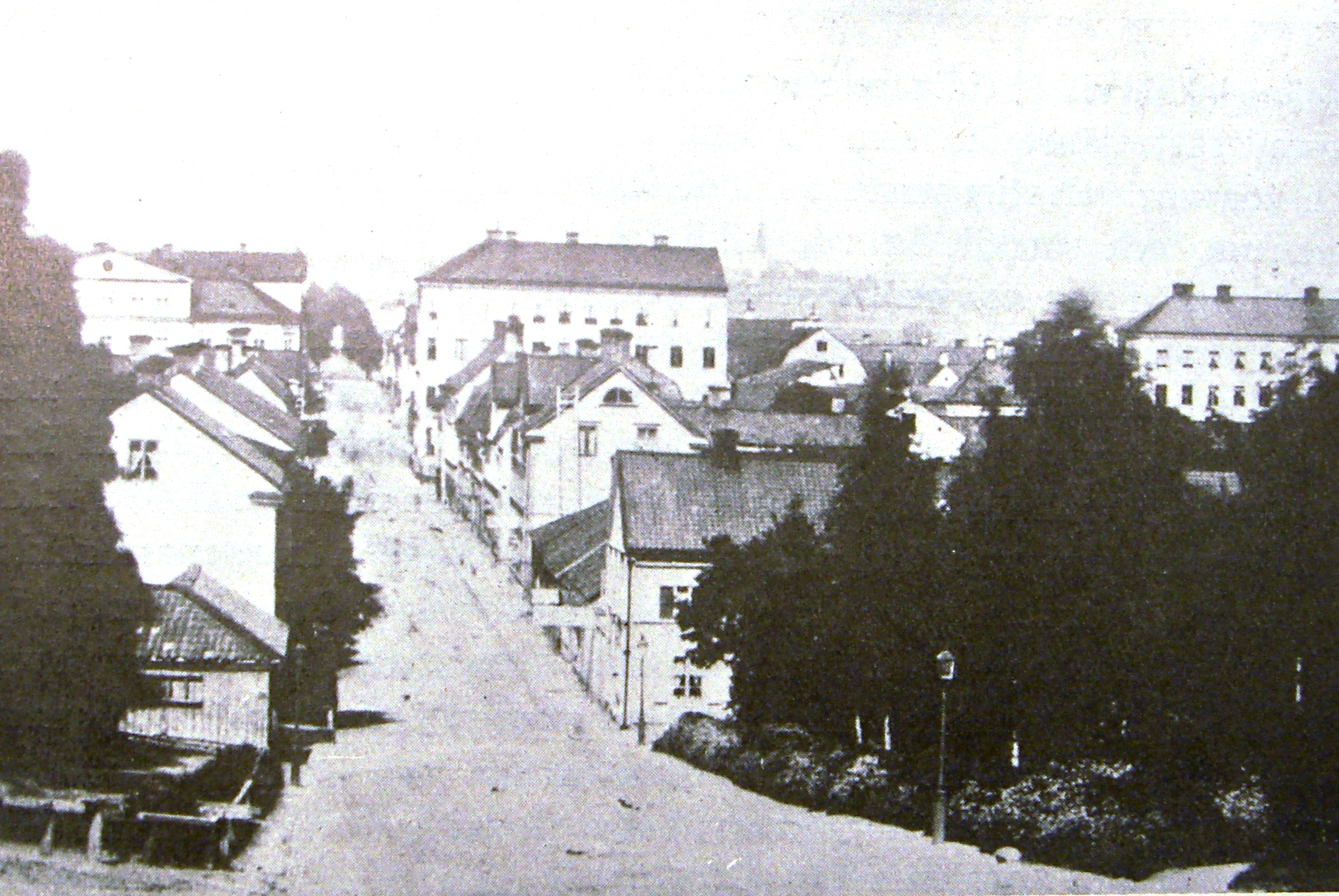 Drottningatan i Uppsala 1860-tal . Photocopy.